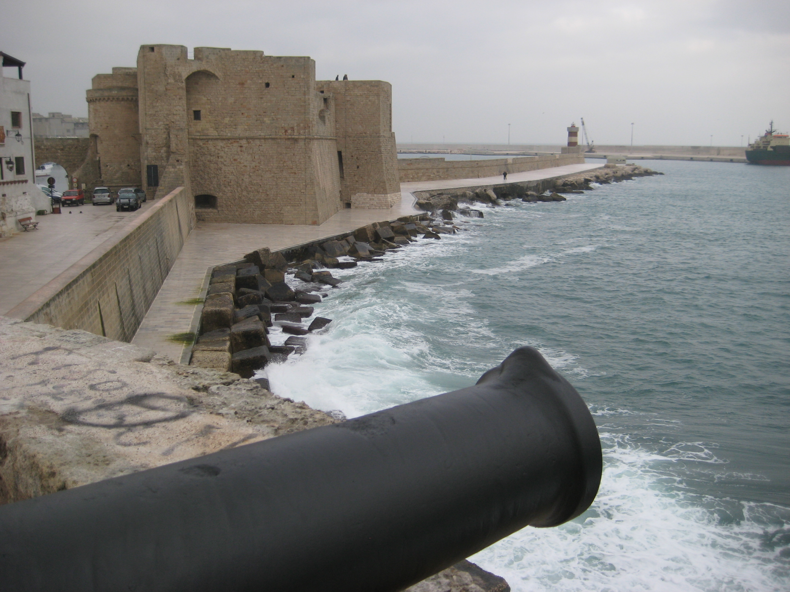 uno dei due cannoni del Bastione S.Maria; fortificazioni di Monopoli lato mare